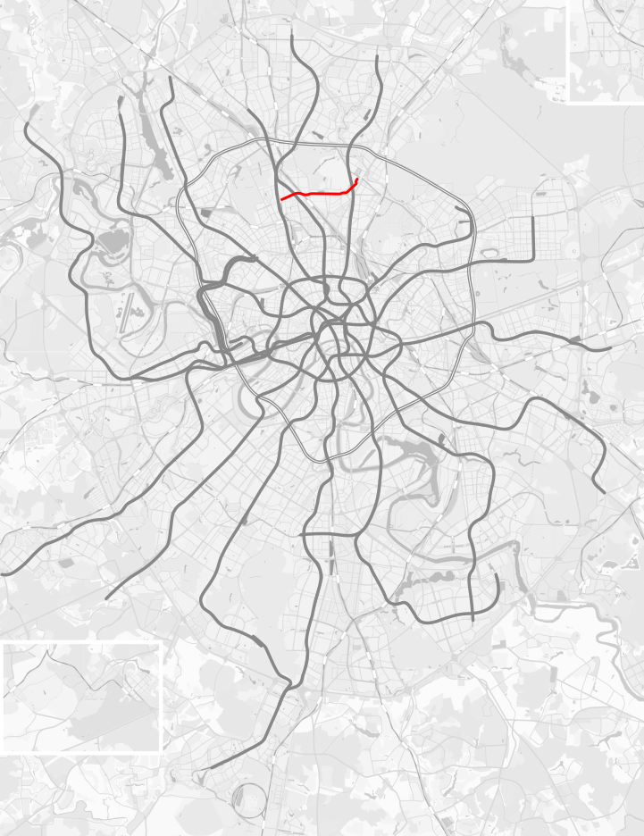 Московский монорельс